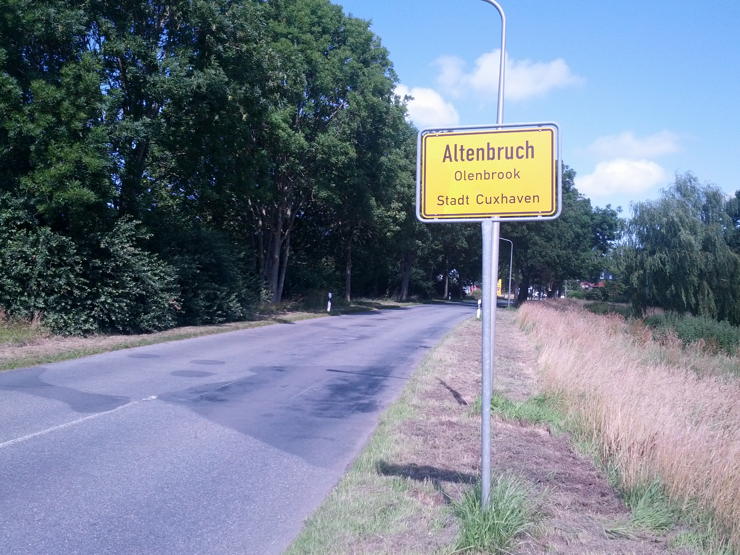 Oortsschild von Olenbrook, Landkreis Cuxhoben, mit den Naam op Hoochdüütsch un op Plattdüütsch